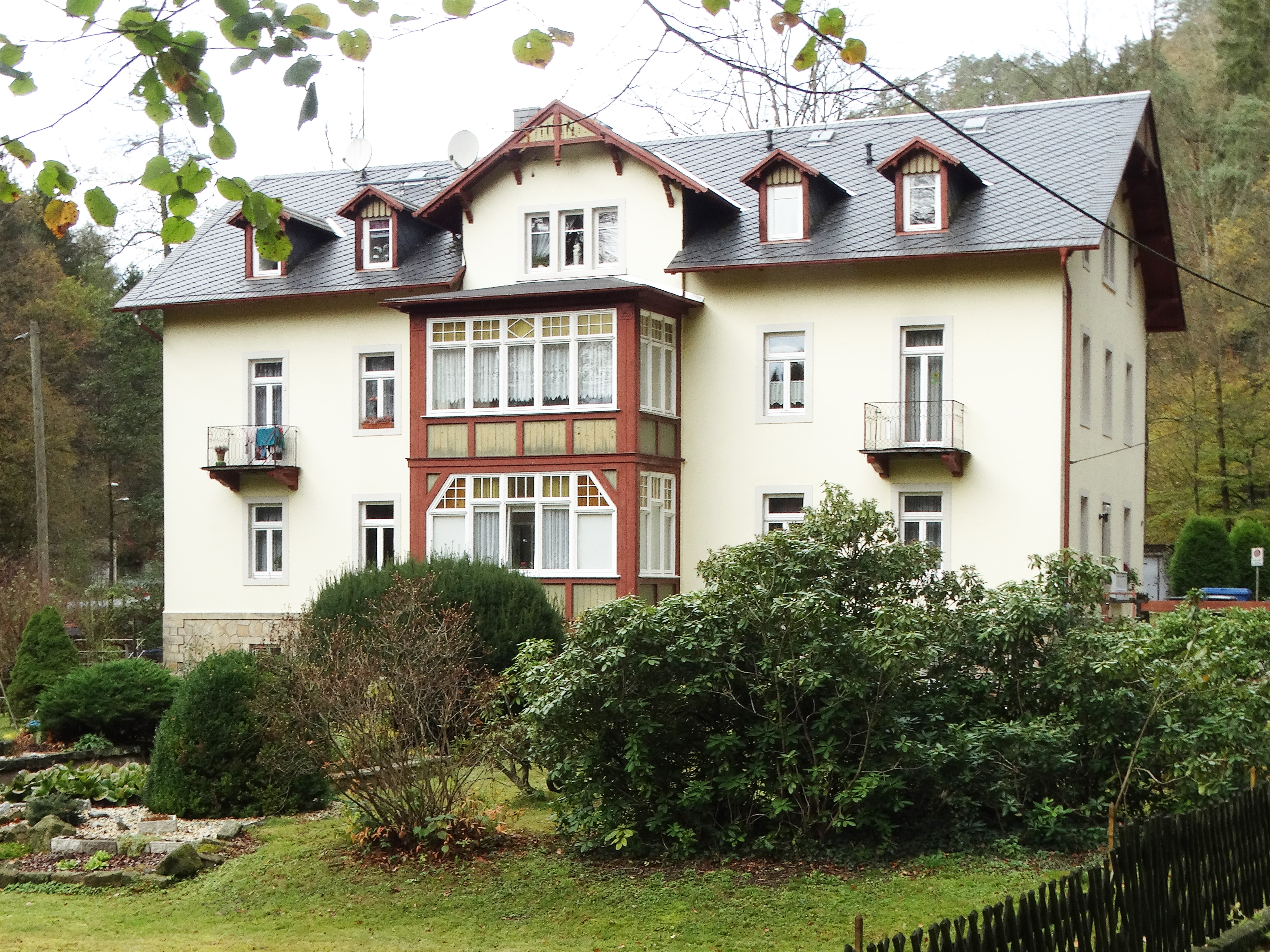 Ehemaliges Gasthofsgebäude der Frinztalmühle (1920 Gastbetrieb eingestellt und Umbau zum Wohnhaus) auf der Hohensteiner Straße 54b in Porschdorf (Bad Schandau)